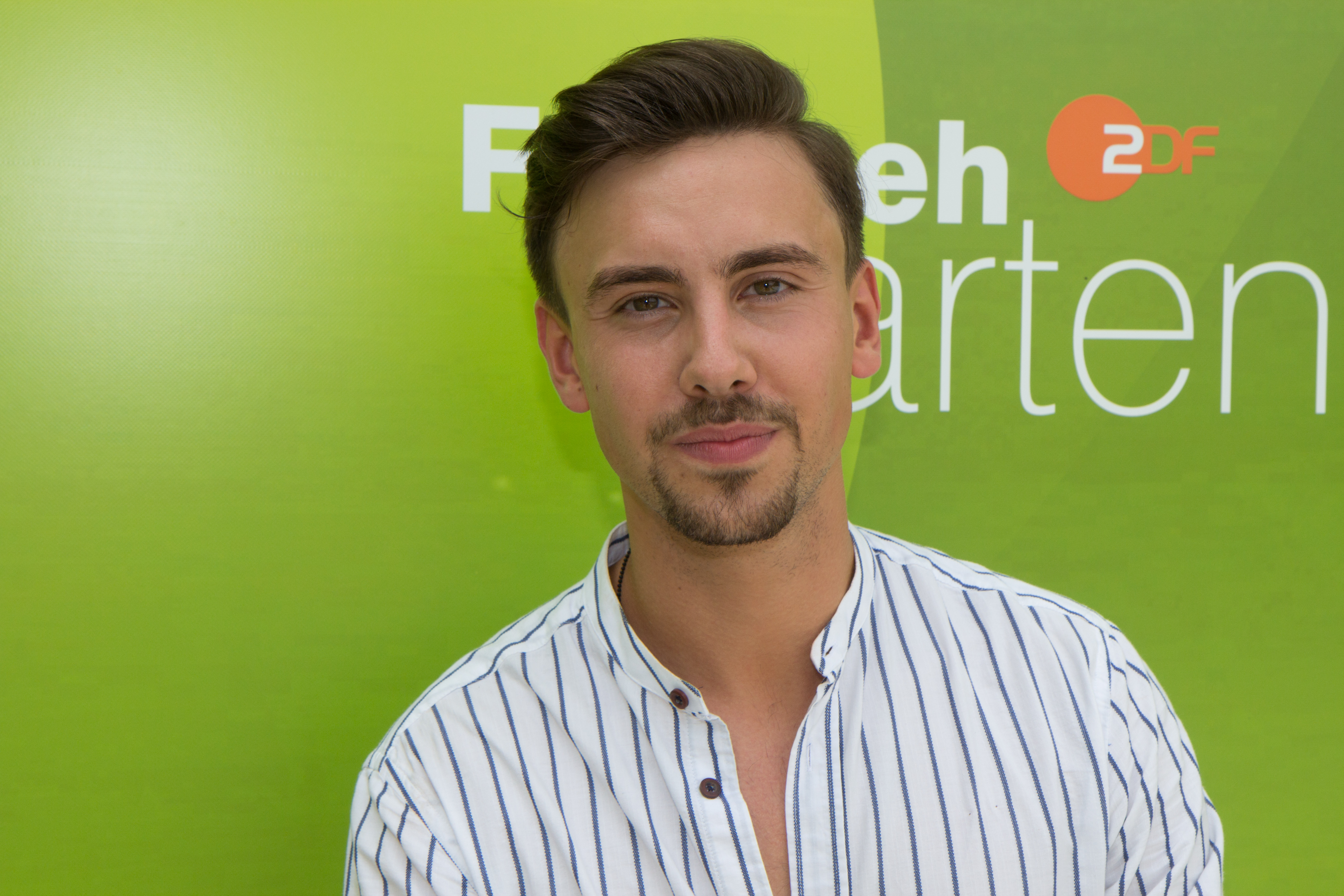 Bandmitglied Sebasttian Wurth von Feuerherz als Gast beim ZDF-Fernsehgarten am 27. Mai 2018 in Mainz.